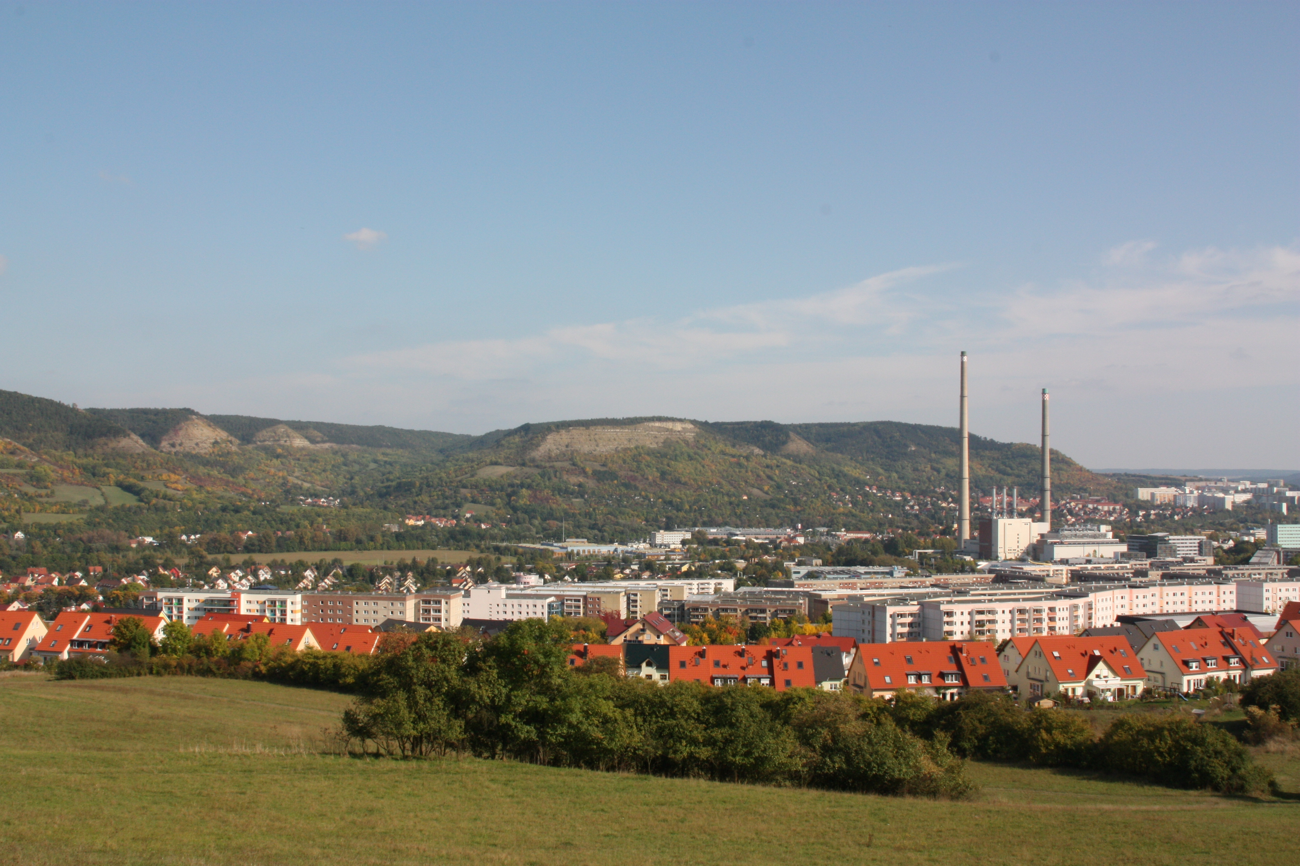 Jena-Lobeda, Johannisberg. Blick von Jena-Winzerla (von Westen).